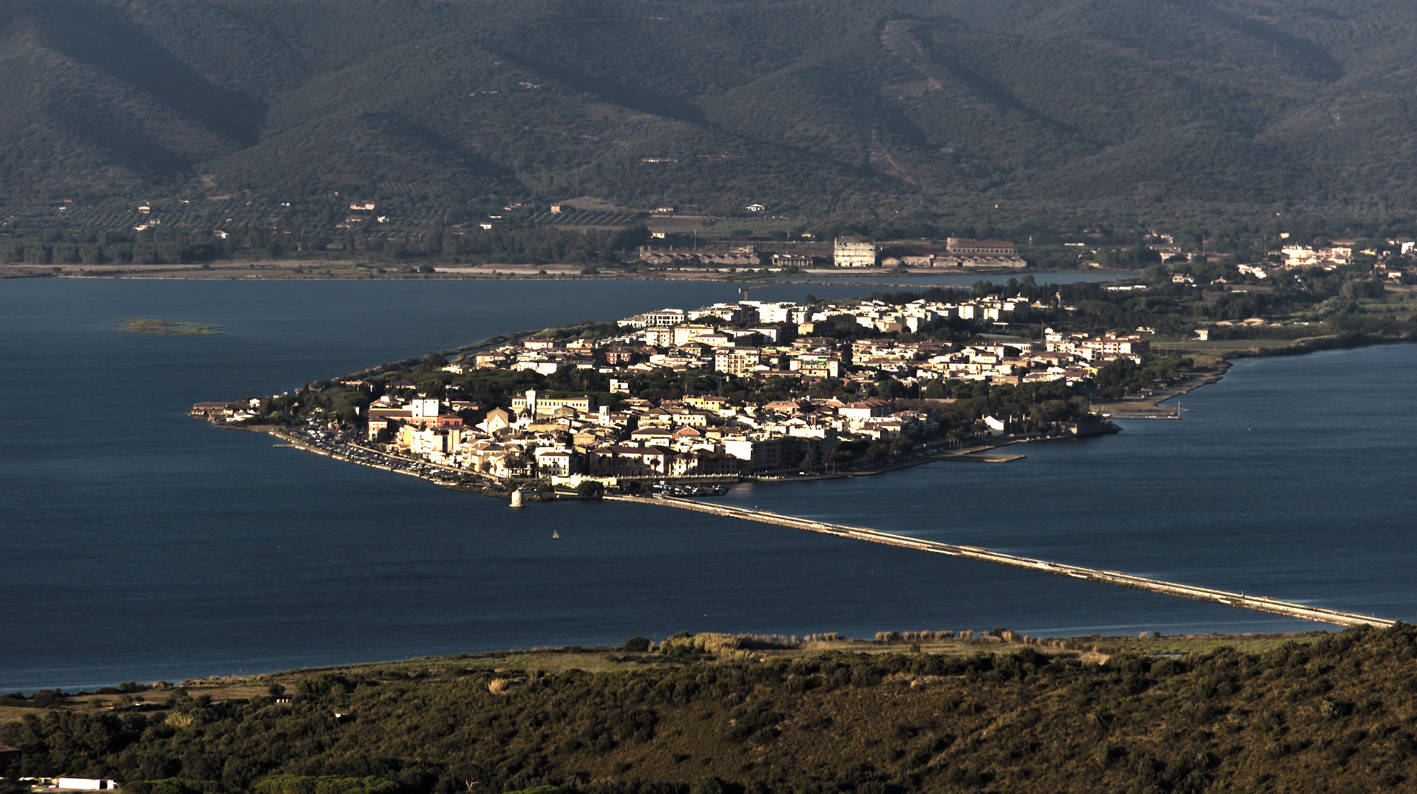 Riserva naturale Laguna di Orbetello di Ponente This is a photo of a monument which is part of cultural heritage of Italy. The authorisation for taking photos of this object was provided by the World Wide Fund for Nature Italy.